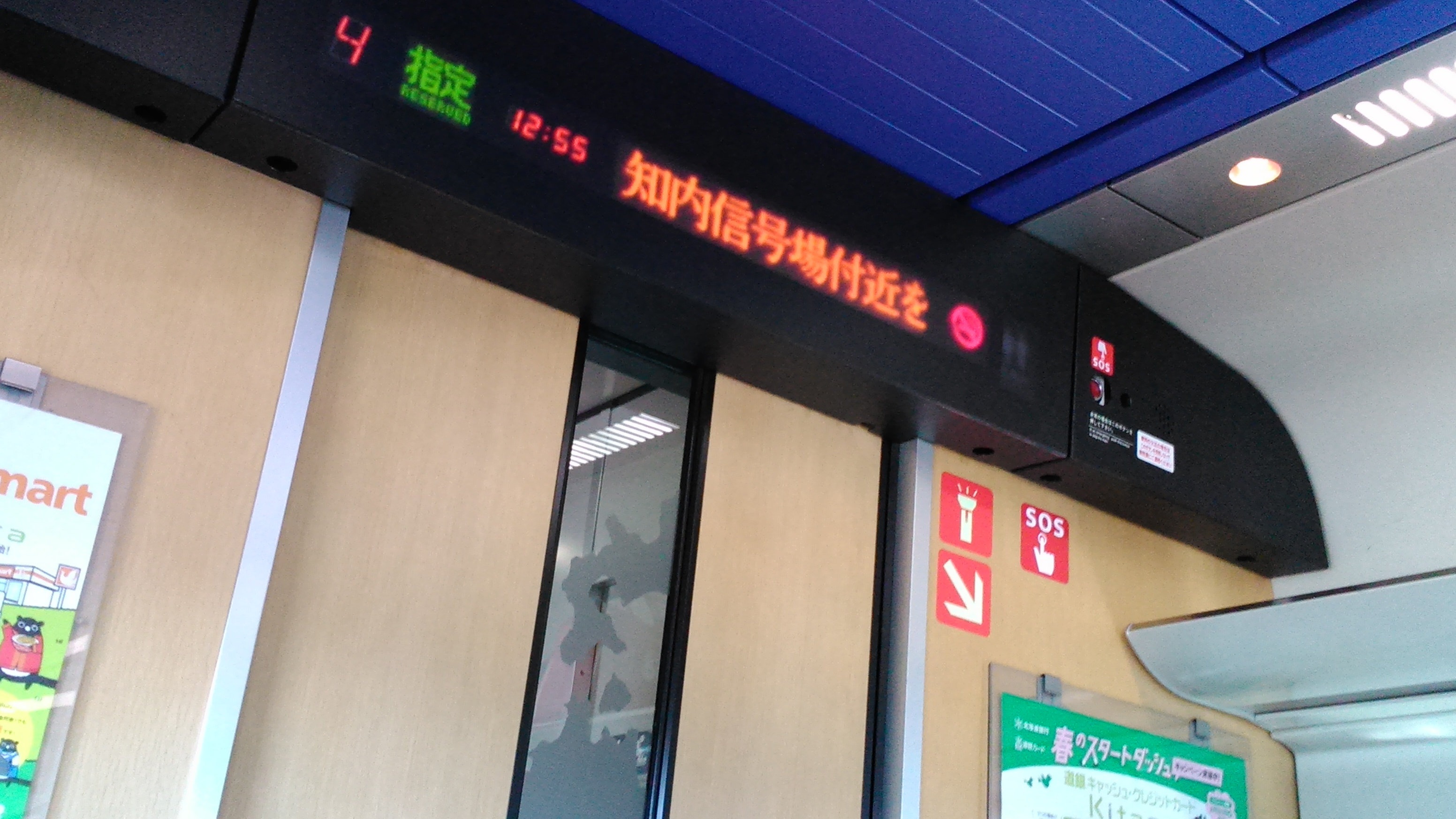 JR北海道列車當駛經知內信號場時，顯示屏顯示「知內信號場」的名稱。